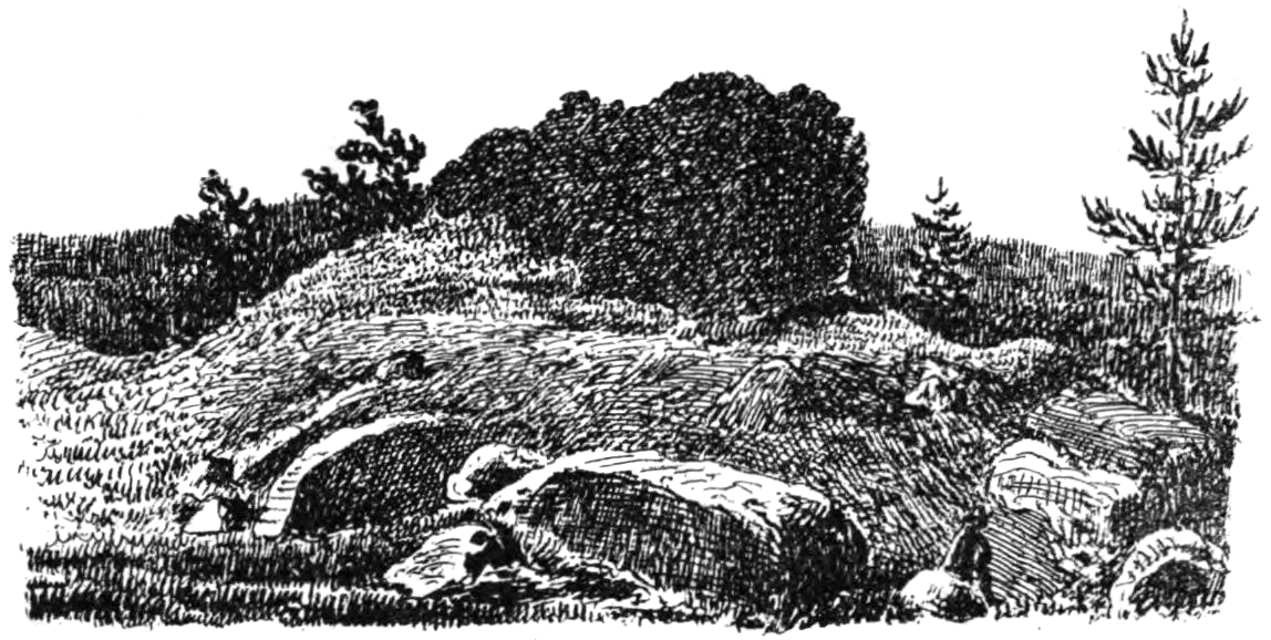 Uttersbergs kastal (Uttersbergs torn) i Östergötland. Teckning i "Utdrag af Antiqvitets-Intendenten P. A. Säves afgifna berättelse för år 1861", publicerad i Antiqvarisk tidskrift för Sverige band 1, 1864.